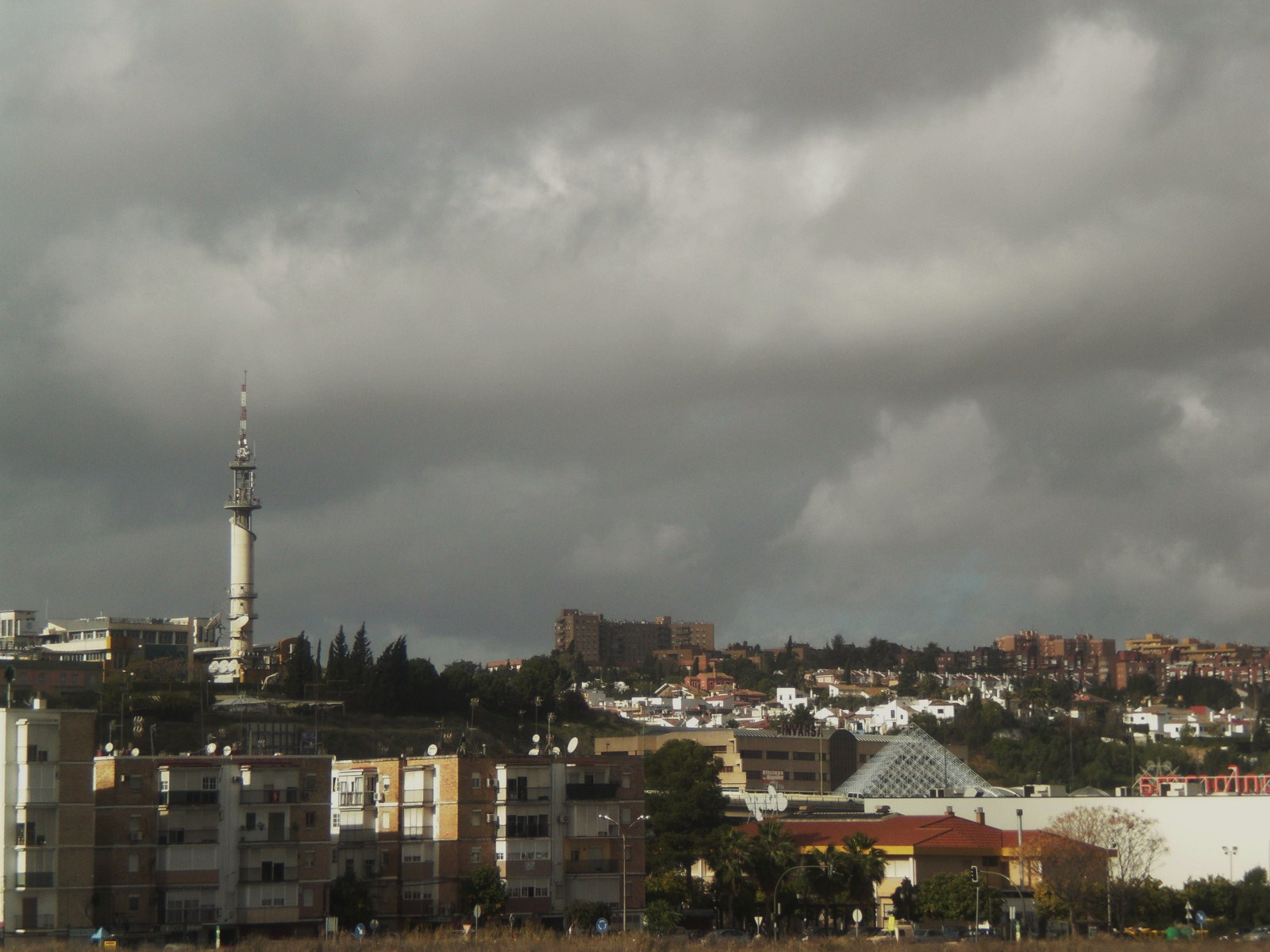 Hoy en día el Aljarafe tiene 338.532 habitantes, población superior a muchas de las capitales de provincia españolas.